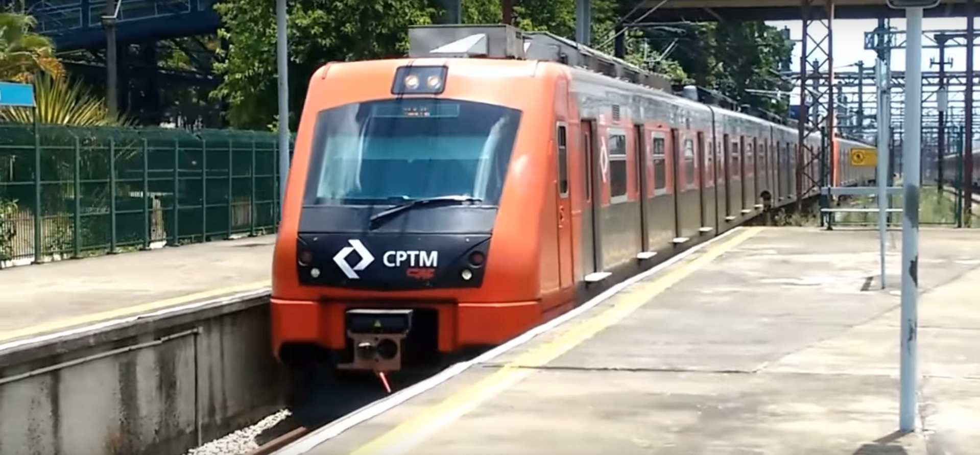 Trem da série 7500 da CPTM em testes na Estação Mauá, pela linha 10.